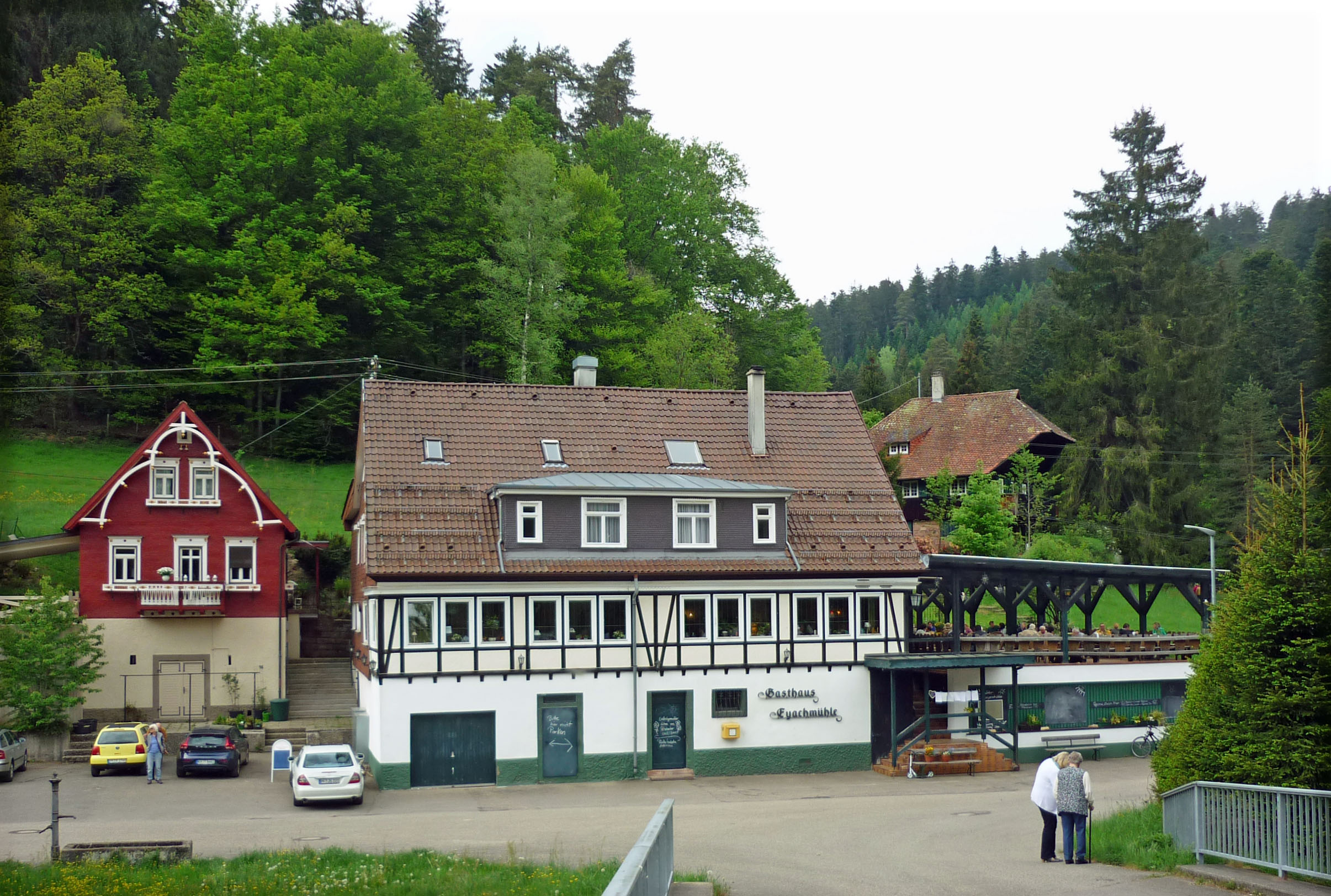 Eyachmühle im Eyachtal bei Dobel im Schwarzwald